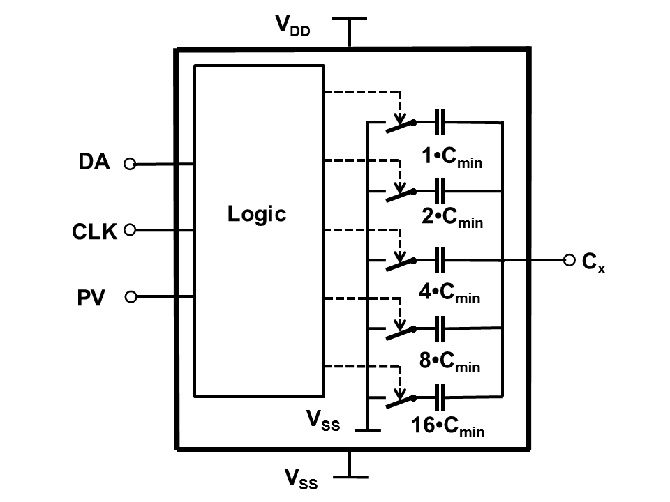 Digital Tunable Capacitor (DTC) Prinzipschaltbild einer 5 bit-DTC-Schaltung